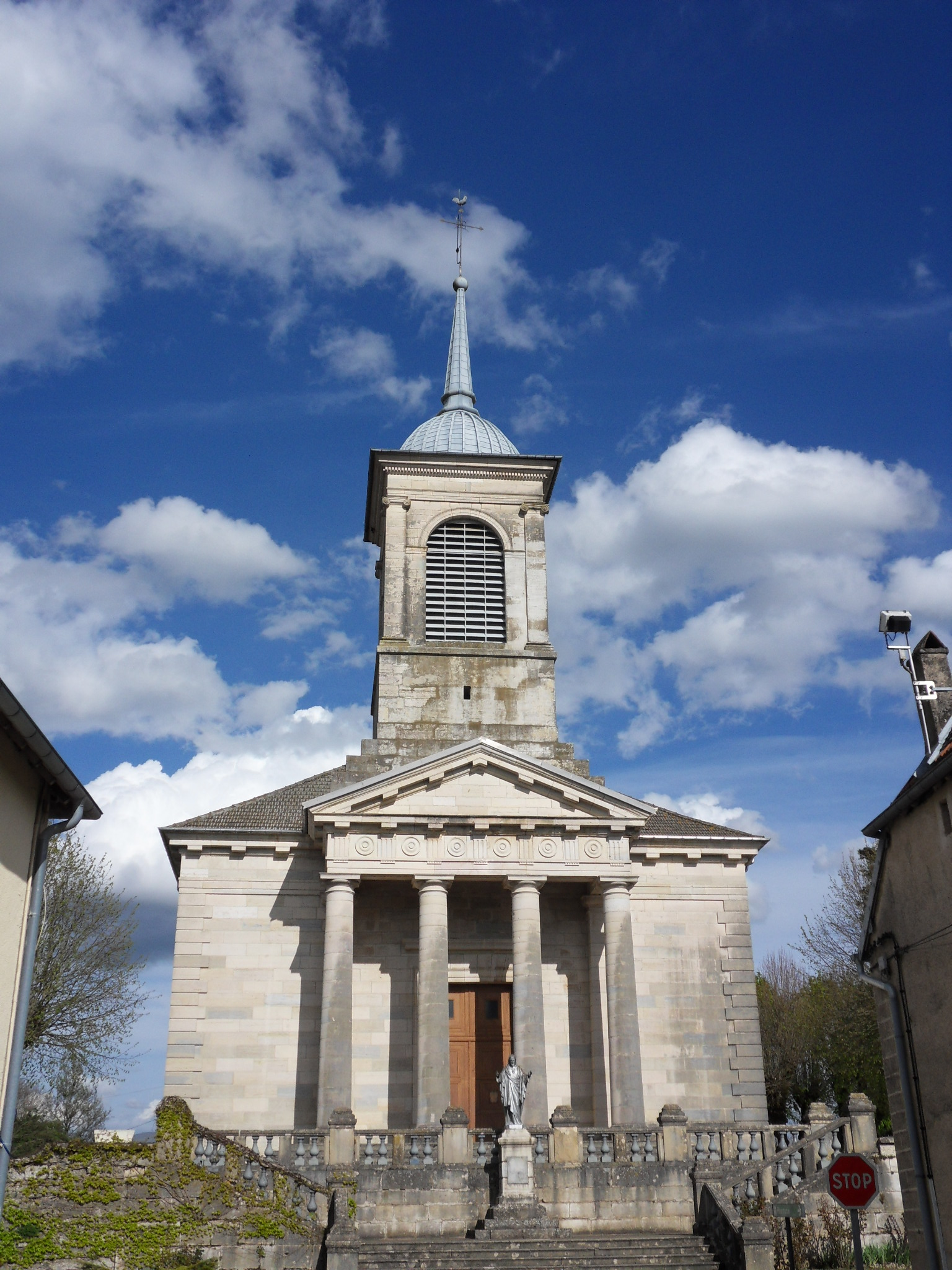 Église de Valay (Haute-Saône).